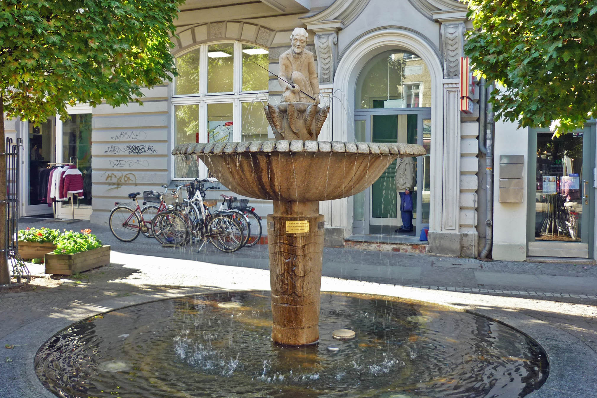 Brandenburg (Havel), Fritze-Bollmann-Brunnen in der Neustädter Hauptstraße